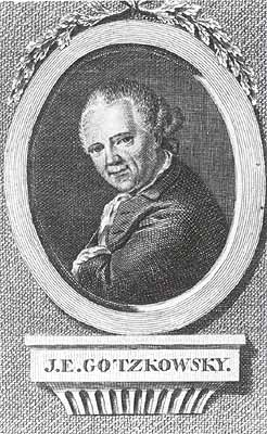 Johann Ernst Gotzkowsky (1710-1775). Kupferstich.